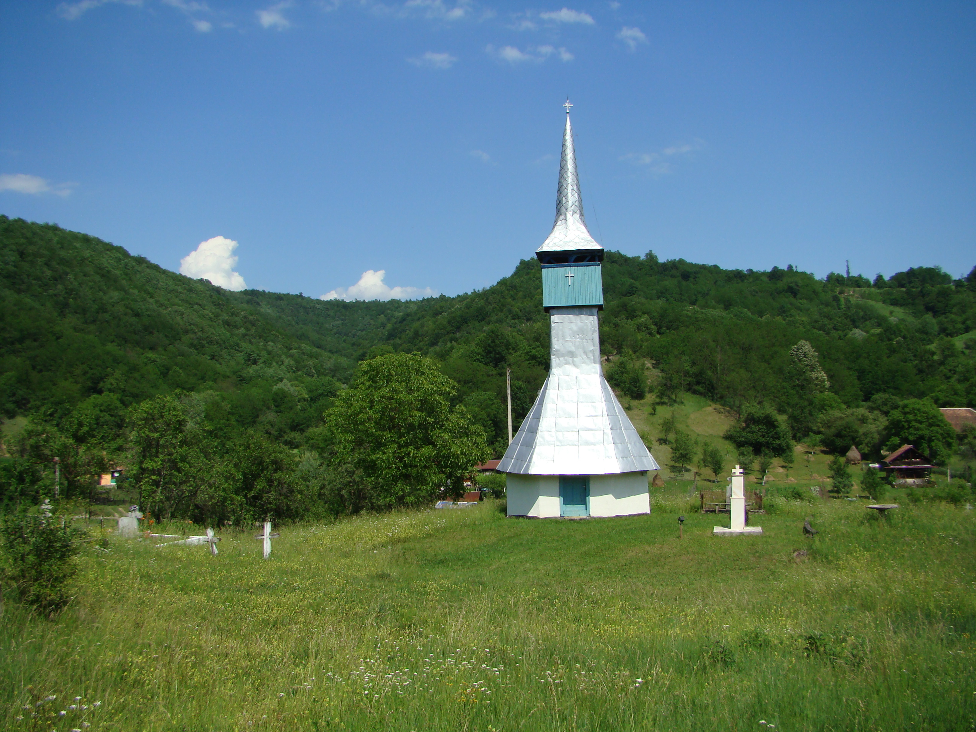 Biserica de lemn din Furcșoara